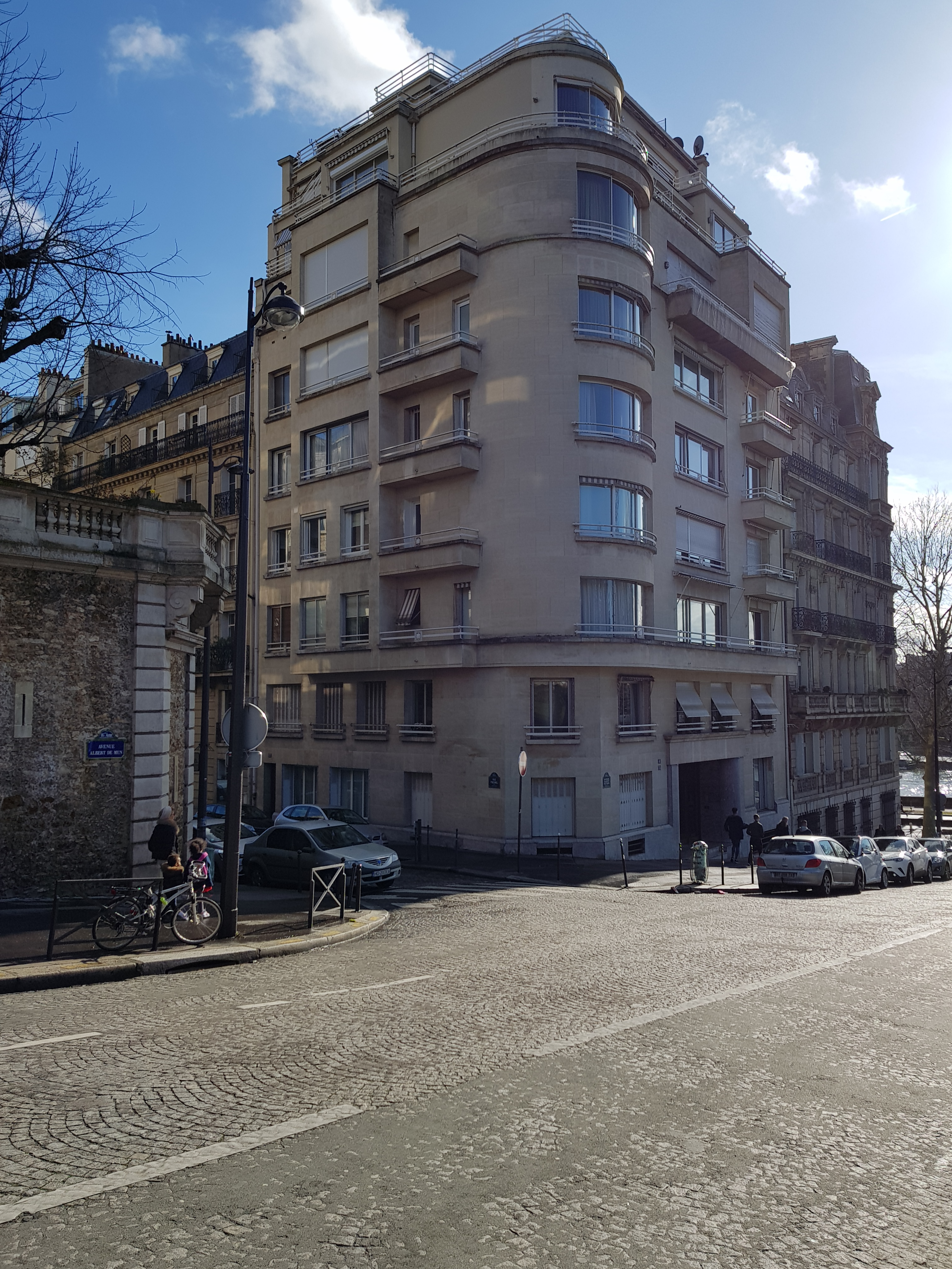 Immeuble situé 4 avenue Albert-de-Mun, Paris 16e. Architecte : Jean Fidler.